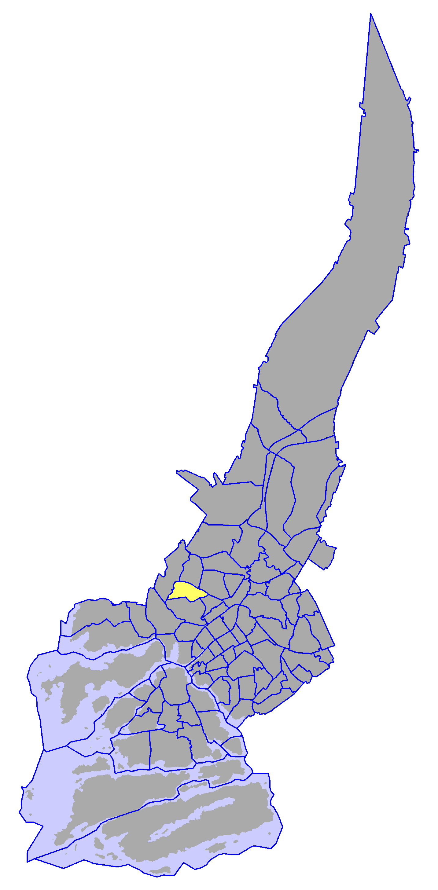 District of Ruohonpää, in Turku